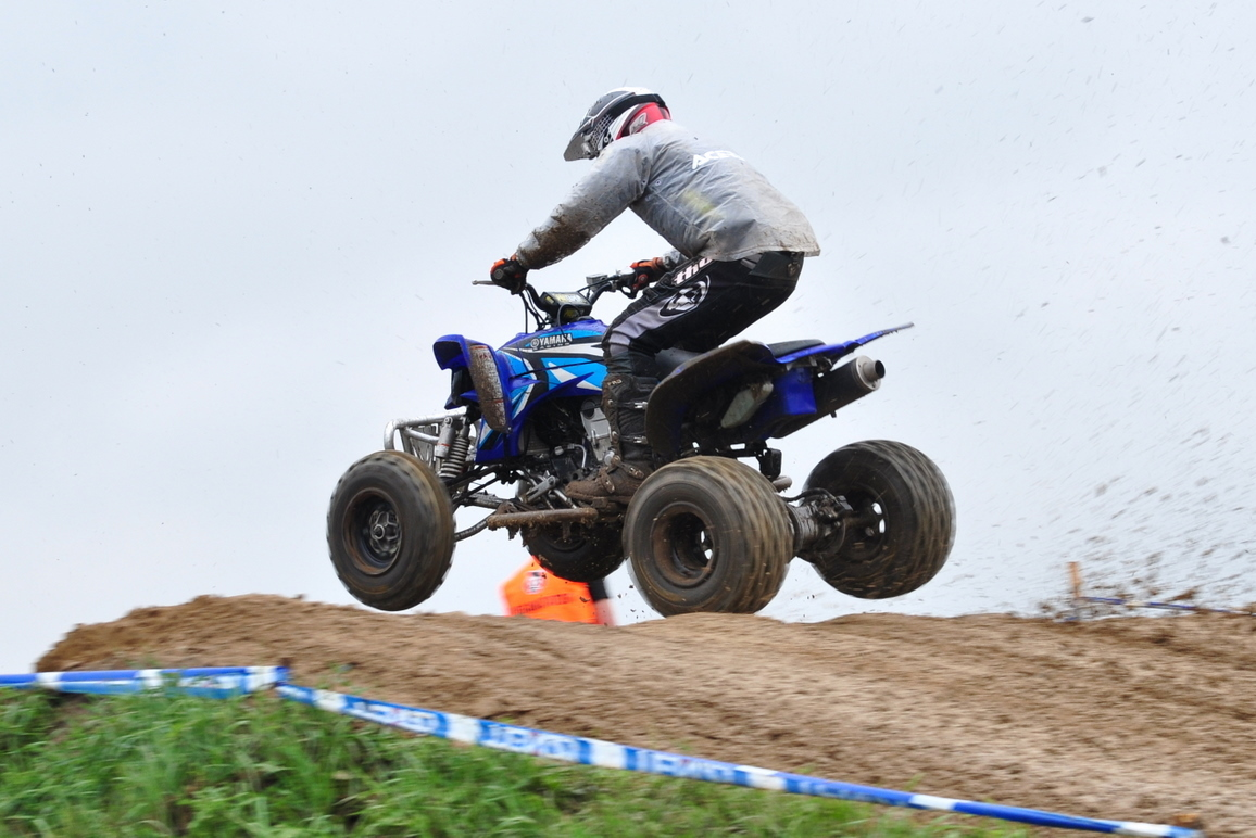 Quad w motocrossie ( Zawody " Off Road nad Wartą " w Gorzowie Wlkp. - 2012 r.)